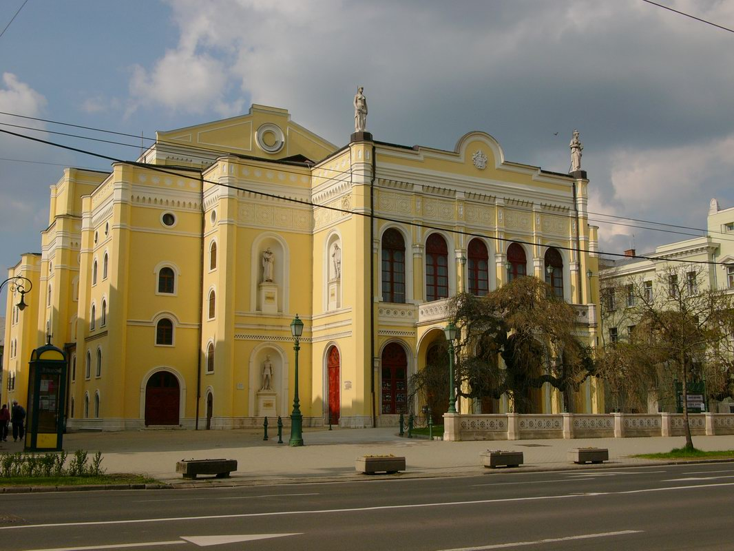 Csokonai Színház, Debrecen (Csokonai Theatre)